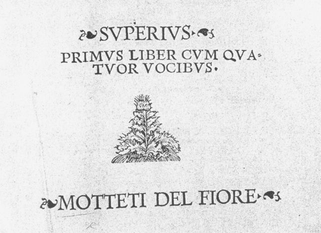 Titelblatt der Motetti del fiore evtl. auch keine Schöpfungshöhe